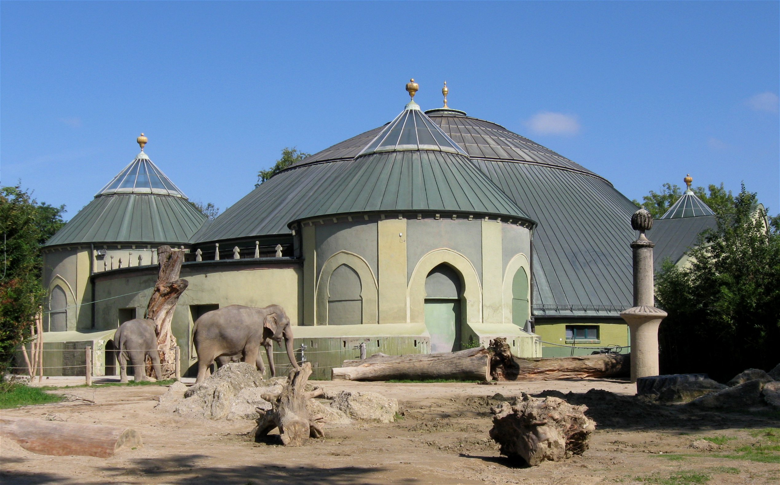 Tierpark Hellabrunn, zwischen Isar und östlichem Talhang gelegene, malerische Landschaftsanlage, nach Entwürfen von Emanuel von Seidl, 1911 eröffnet. Elefantenhaus (Haus für Warmblüter), 1911 von Emanuel von Seidl, orientalisierender Bau auf querovalem Grundriß, freitragende Beton-Glas-Kuppel, vier Eckpavillons; zum Gebäude gehören sechs freistehende Pfeiler.